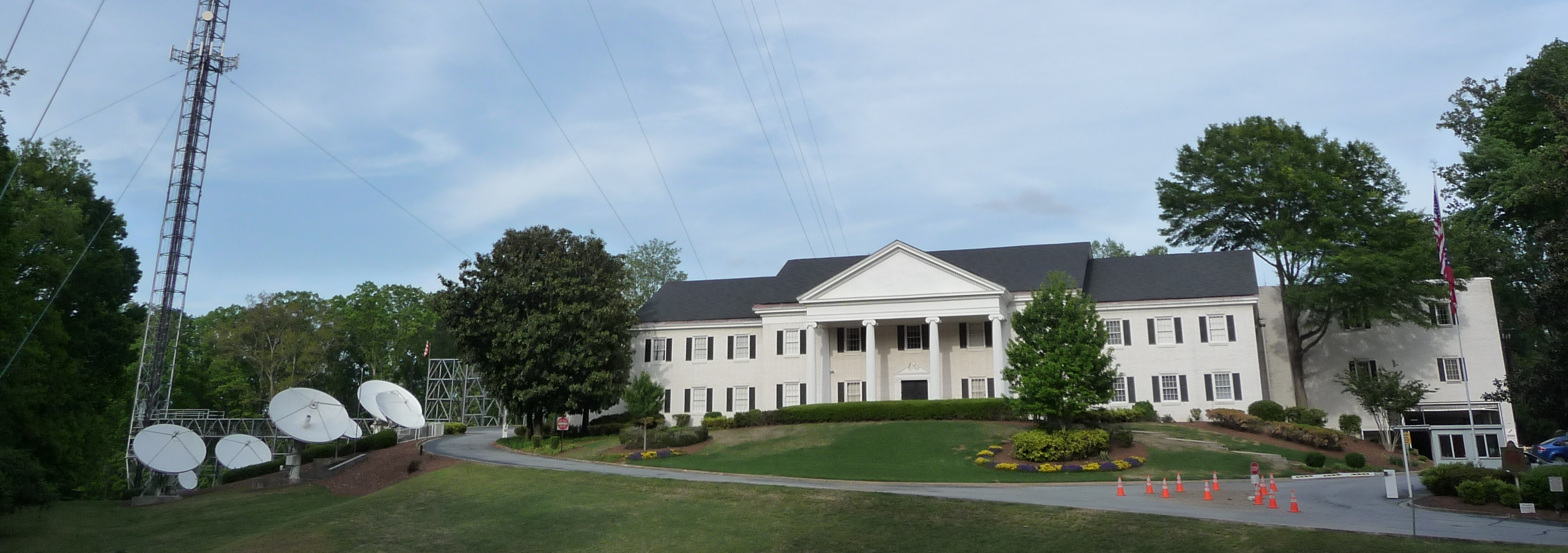 WAGA studios